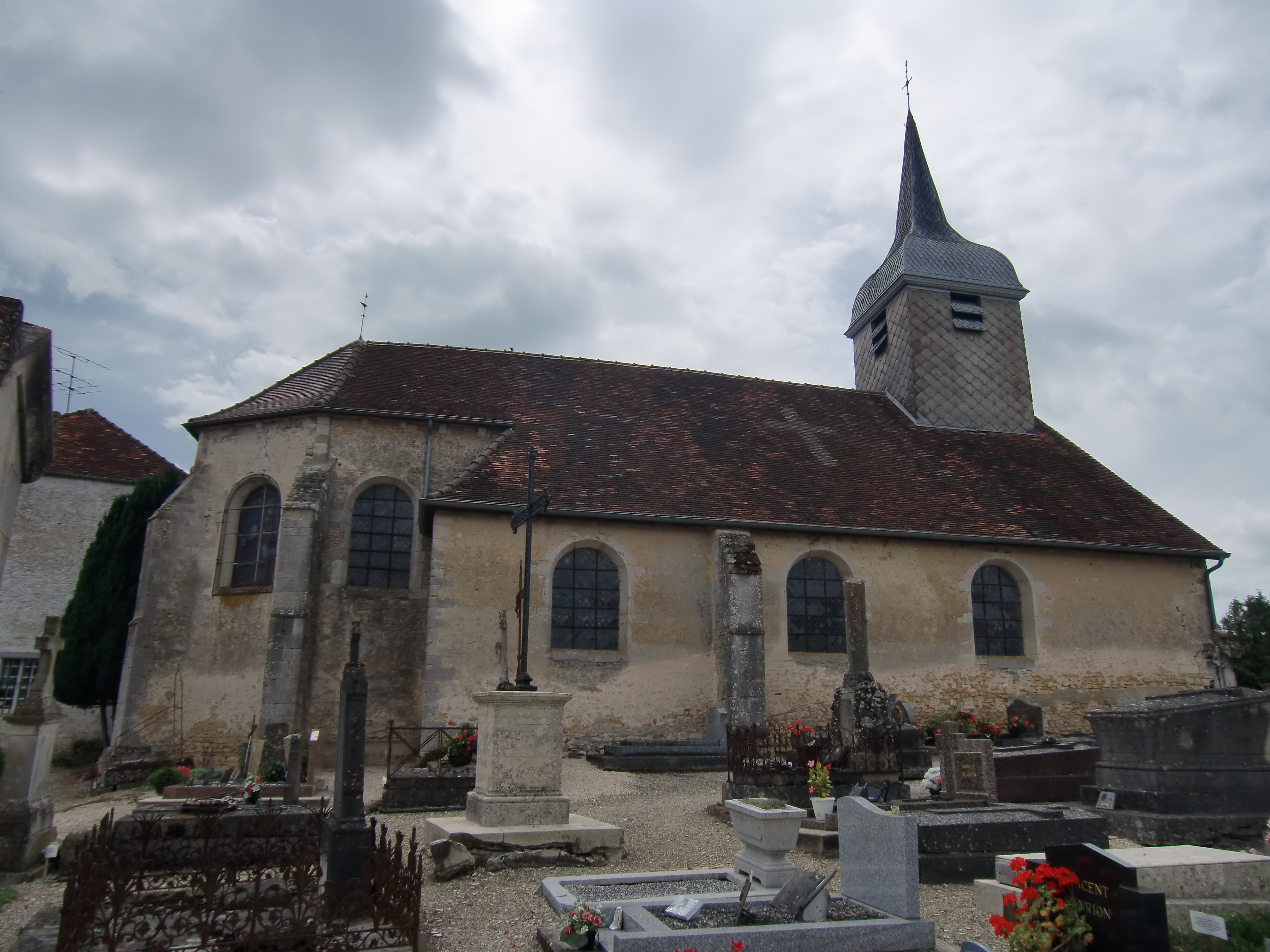 église d'Eclance (Aube - Champagne - France)